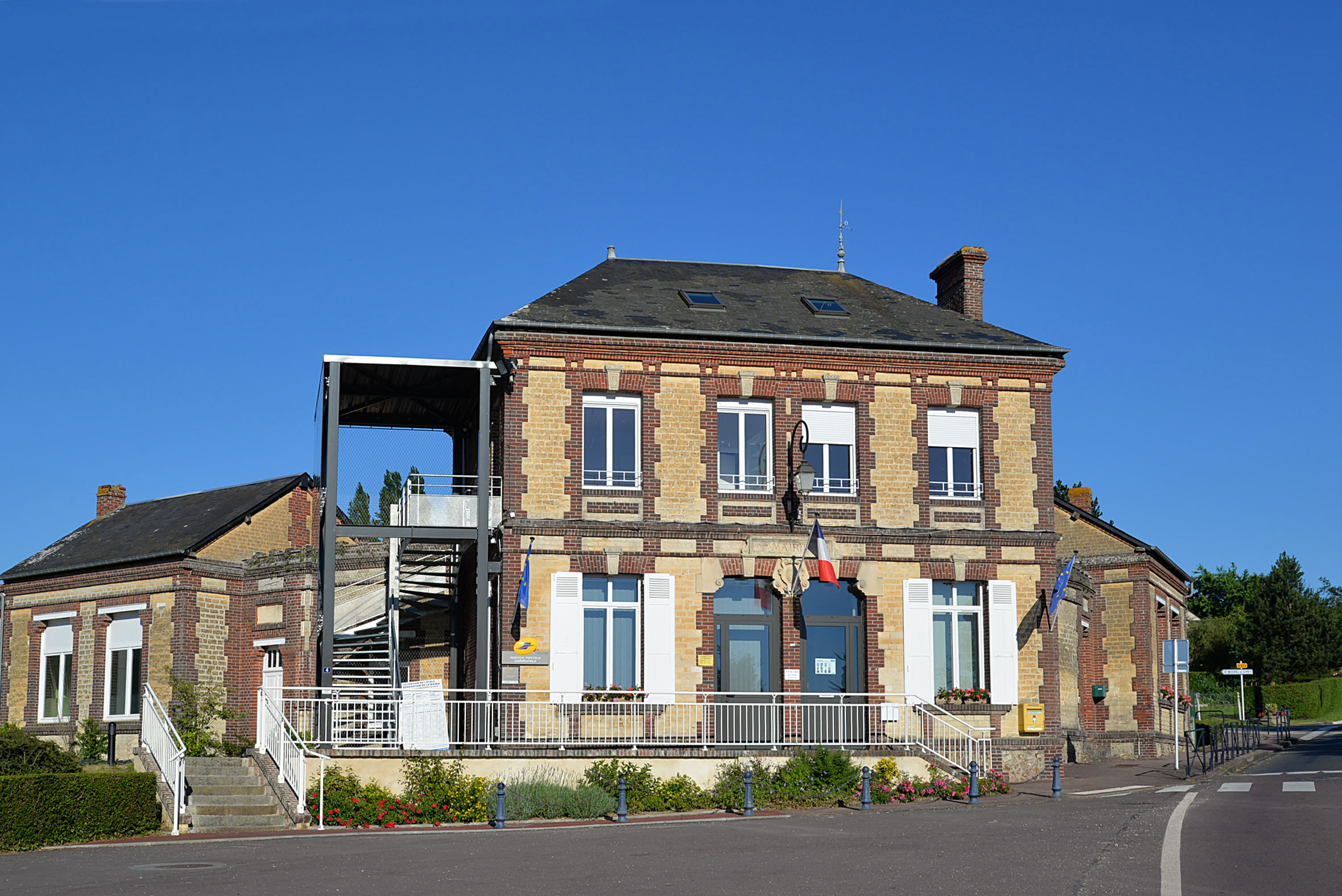 Sainte-Marguerite-de Viette (Calvados)